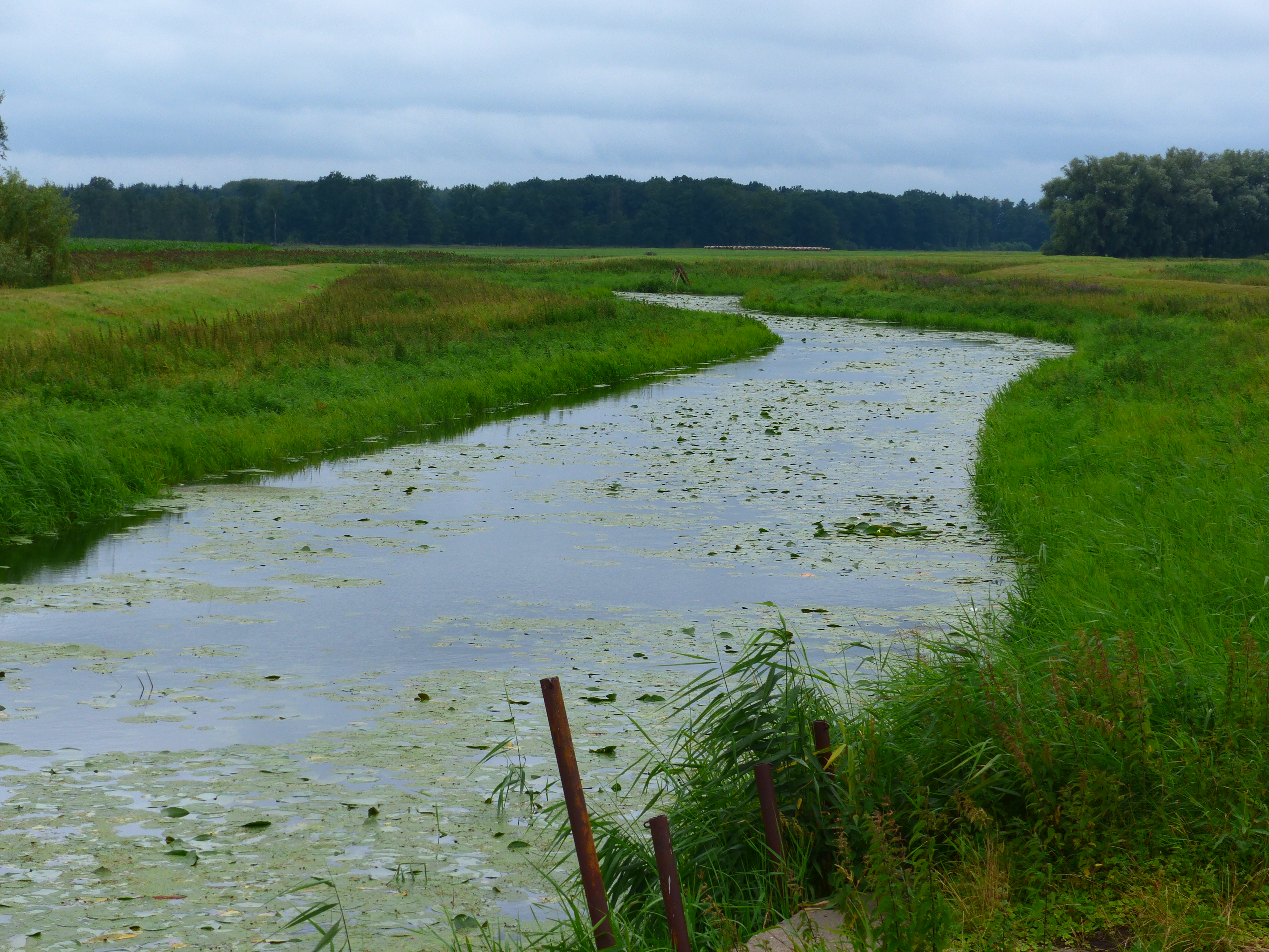 Ryckgraben bei Groß Petershagen, von der K 4 nach Jarmshagen flussaufwärts gesehen